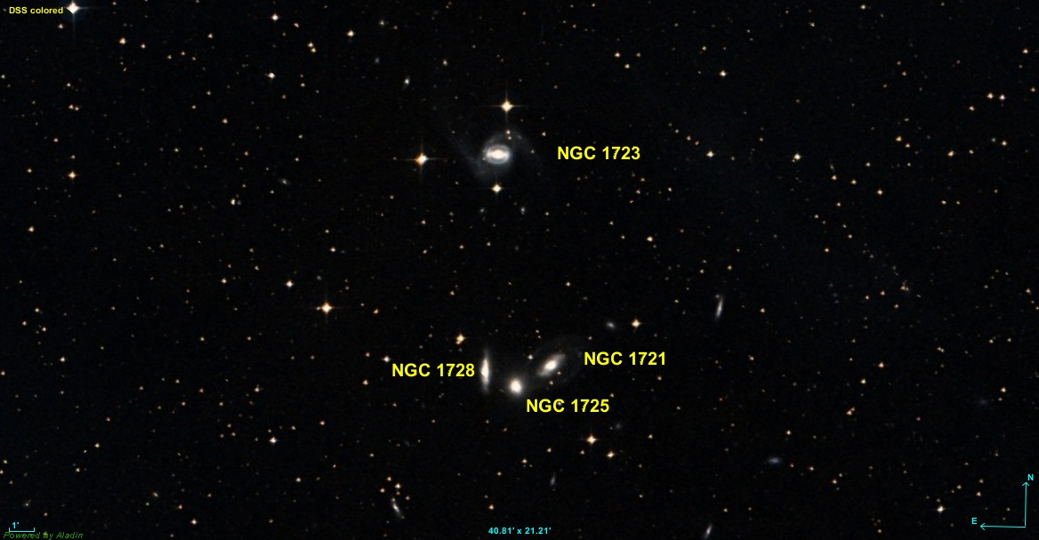 Image construite à l'aide des données en format FIT mises à la disposition du public par Digitized Sky Survey et du logiciel Aladin.